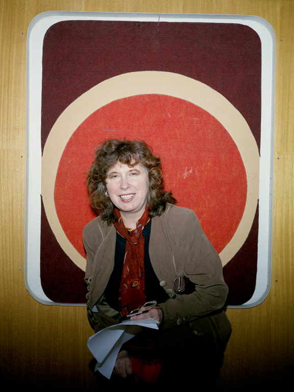 Fotografie z cyklu Unofficial, ve kterém popisovala život na Slovensku po pádu komunismu Fotografie z cyklu Unofficial, ve kterém popisovala život na Slovensku po pádu komunismu